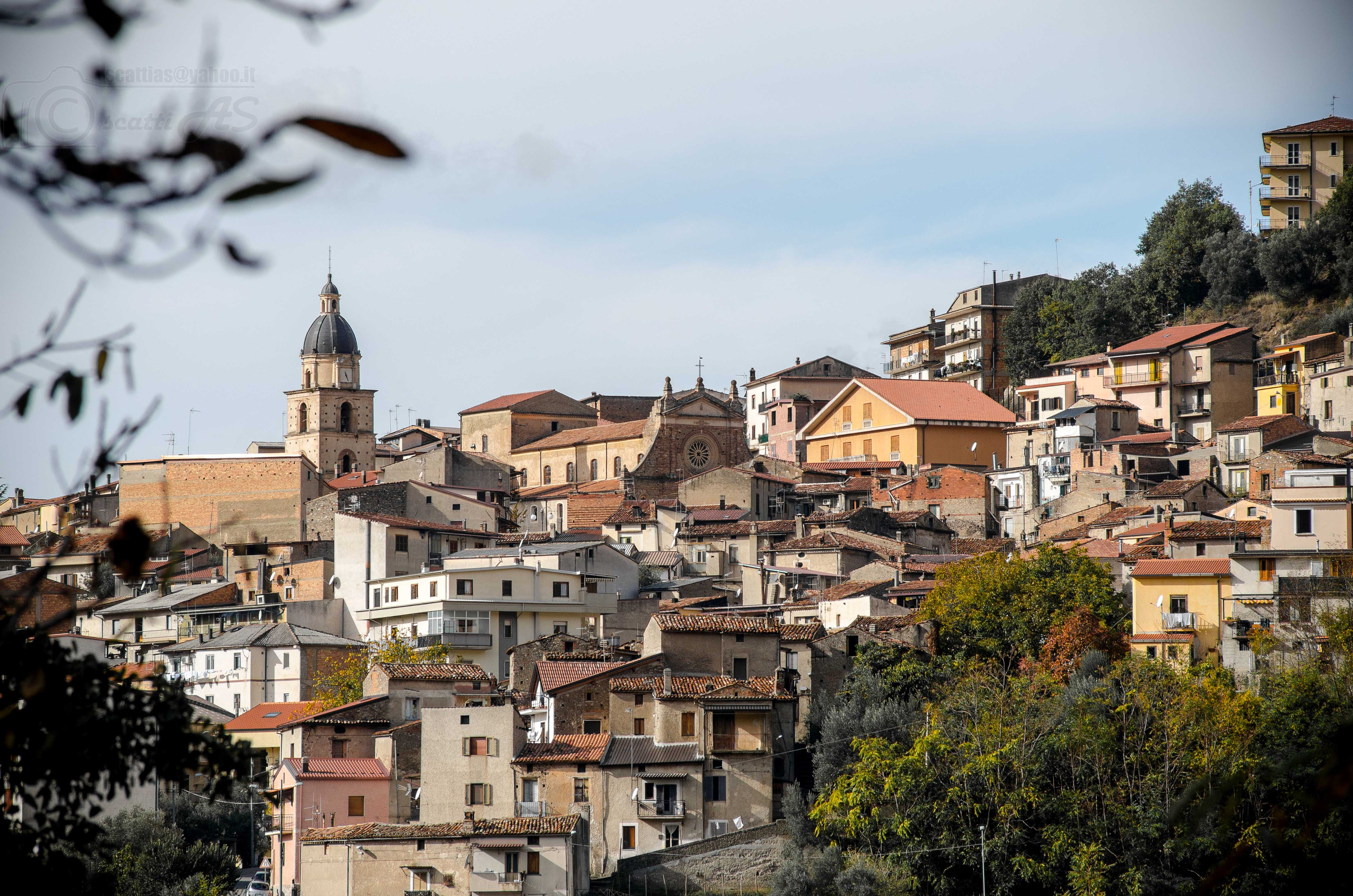 Pedace visto dalla fontana di "scigafresa"